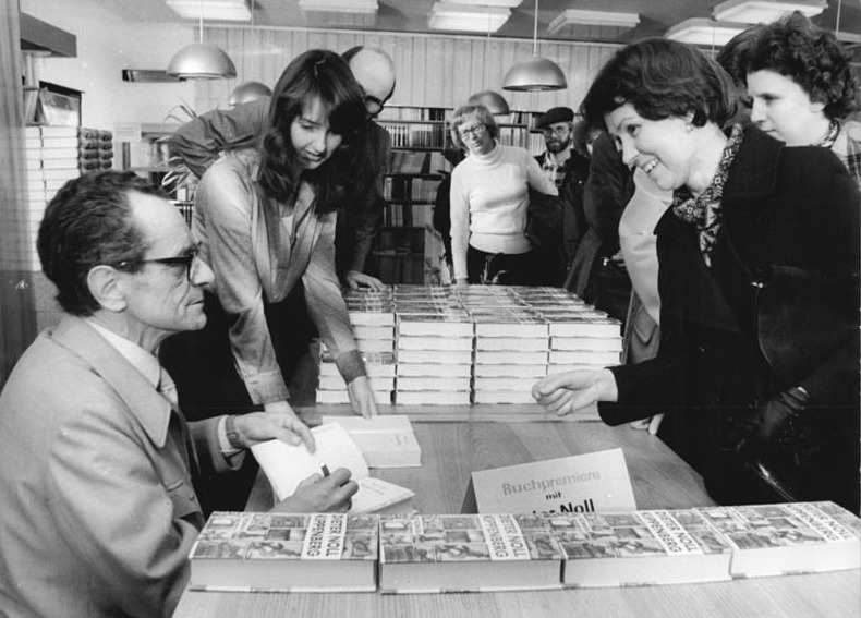 Berlin, Autogrammstunde Dieter Noll ADN-ZB Senft 22.3.79 Berlin: Buchpremiere Im Internationalen Buch in der Hauptstadt signierte am 22.3.1979 der Schriftsteller Dieter Noll (l) seinen neuen Roman "Kippenberg". Abgebildete Personen: Noll, Dieter: Schriftsteller, DDR (GND 119157322)